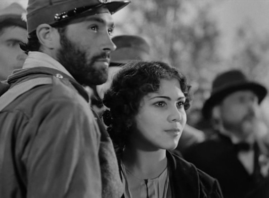 Screenshot del film 1860 (1934) di Alessandro Blasetti.